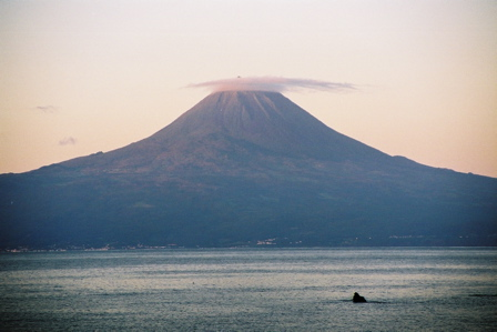 Pico, Azoren, Portugal